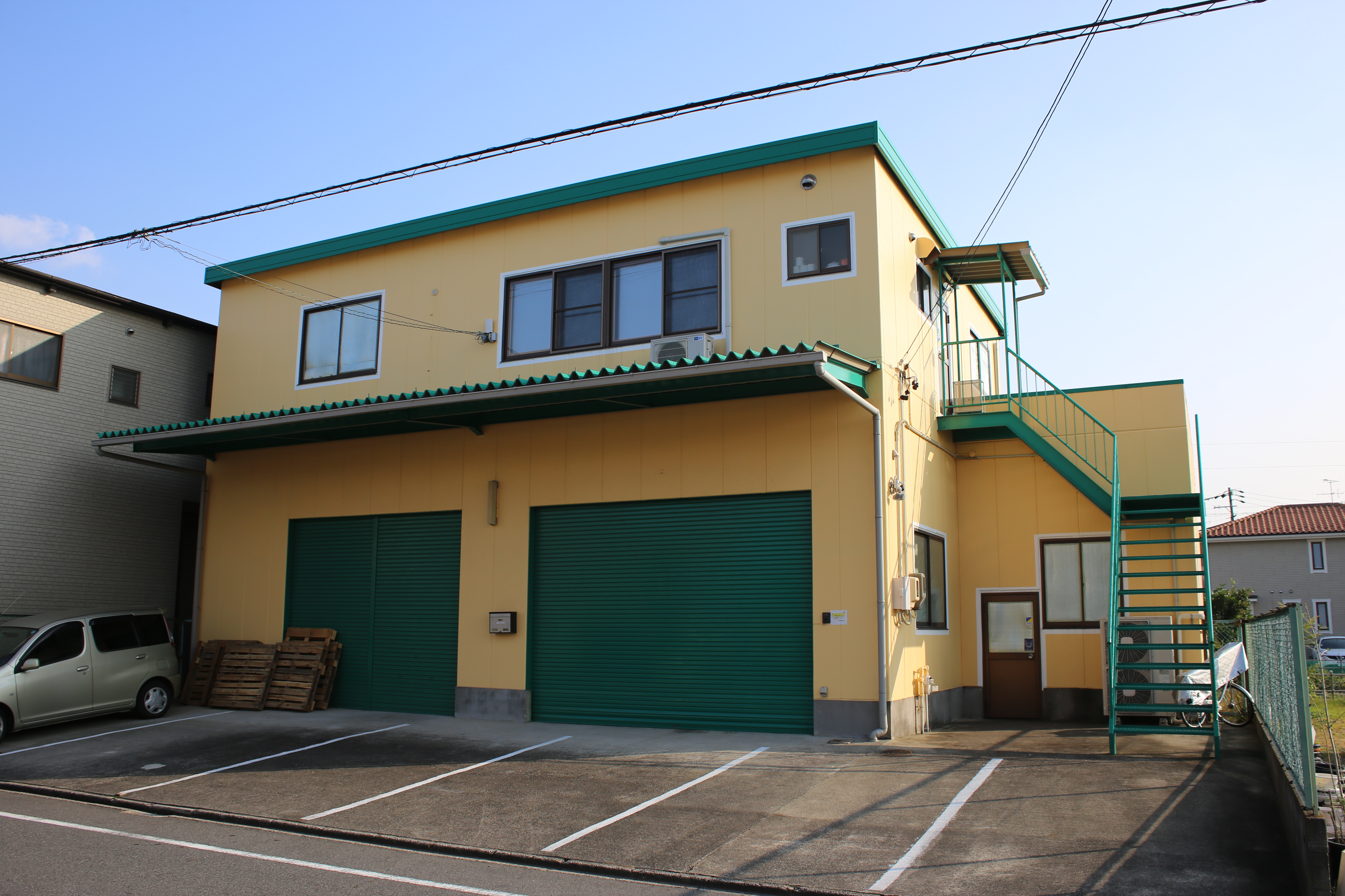 名古屋市中村区稲葉地町5丁目の一心商事本社を北側公道西側より撮影